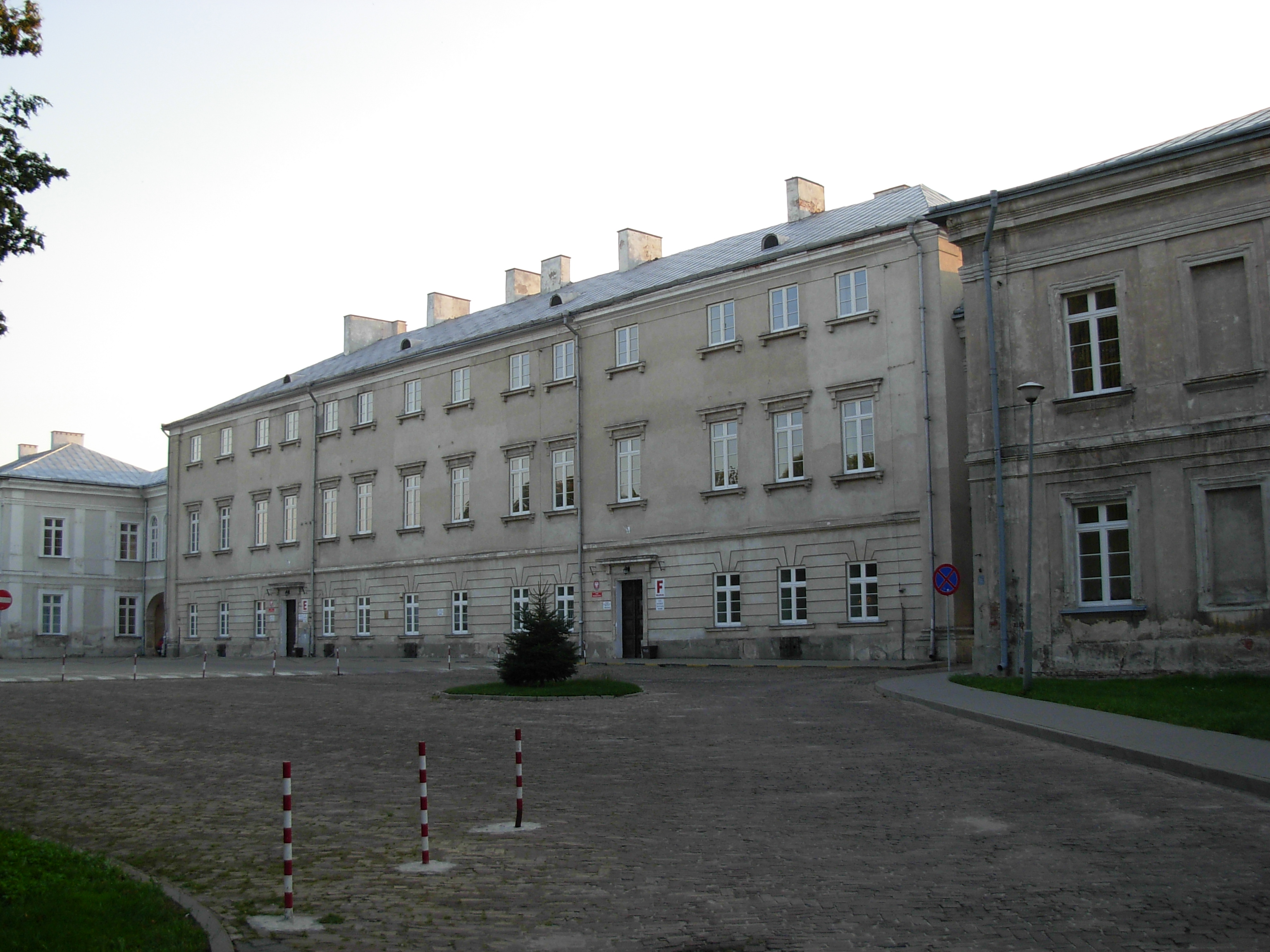 Zamość, Poland.